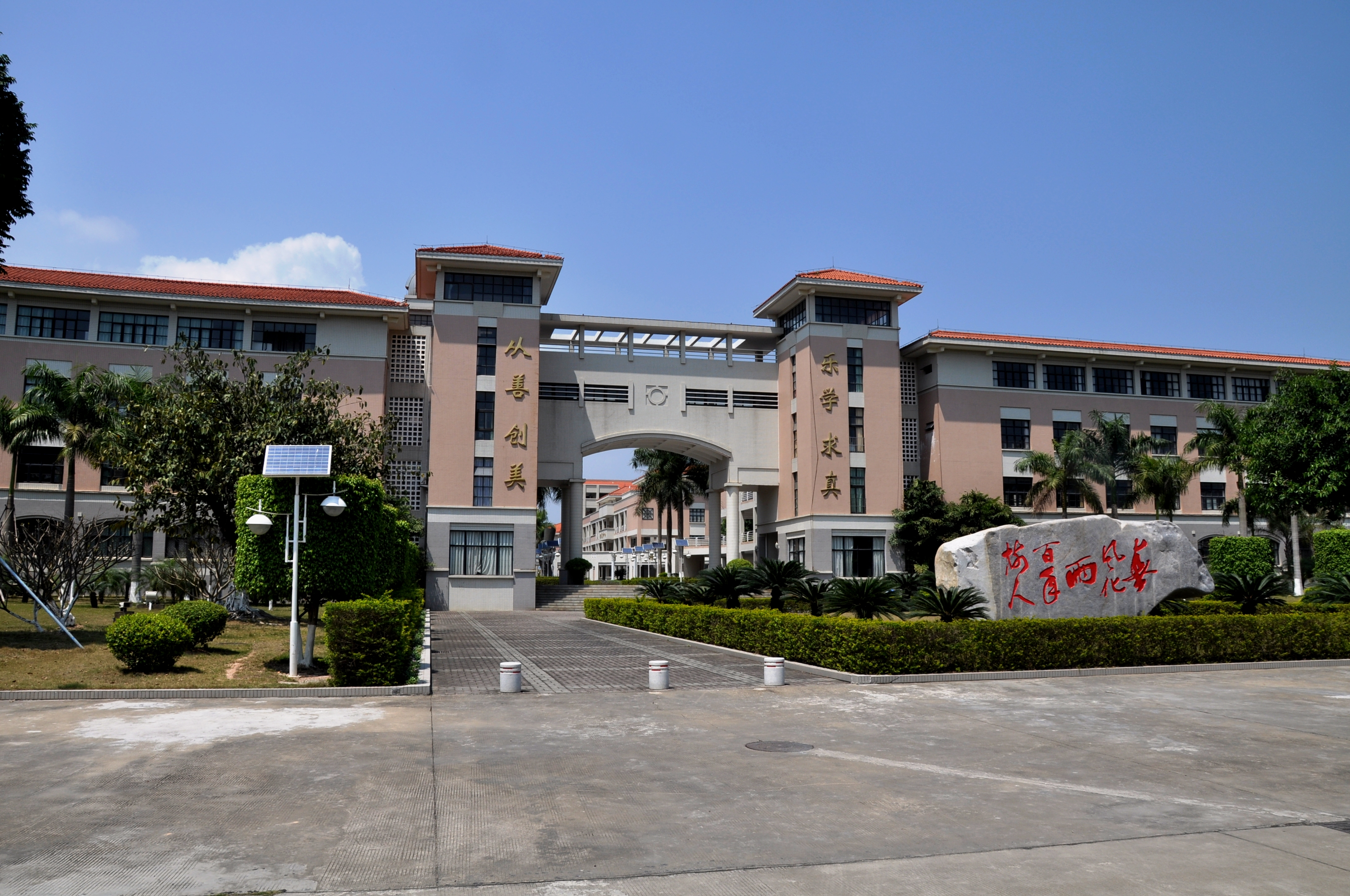 珠海一中主校道及行政楼、实验楼